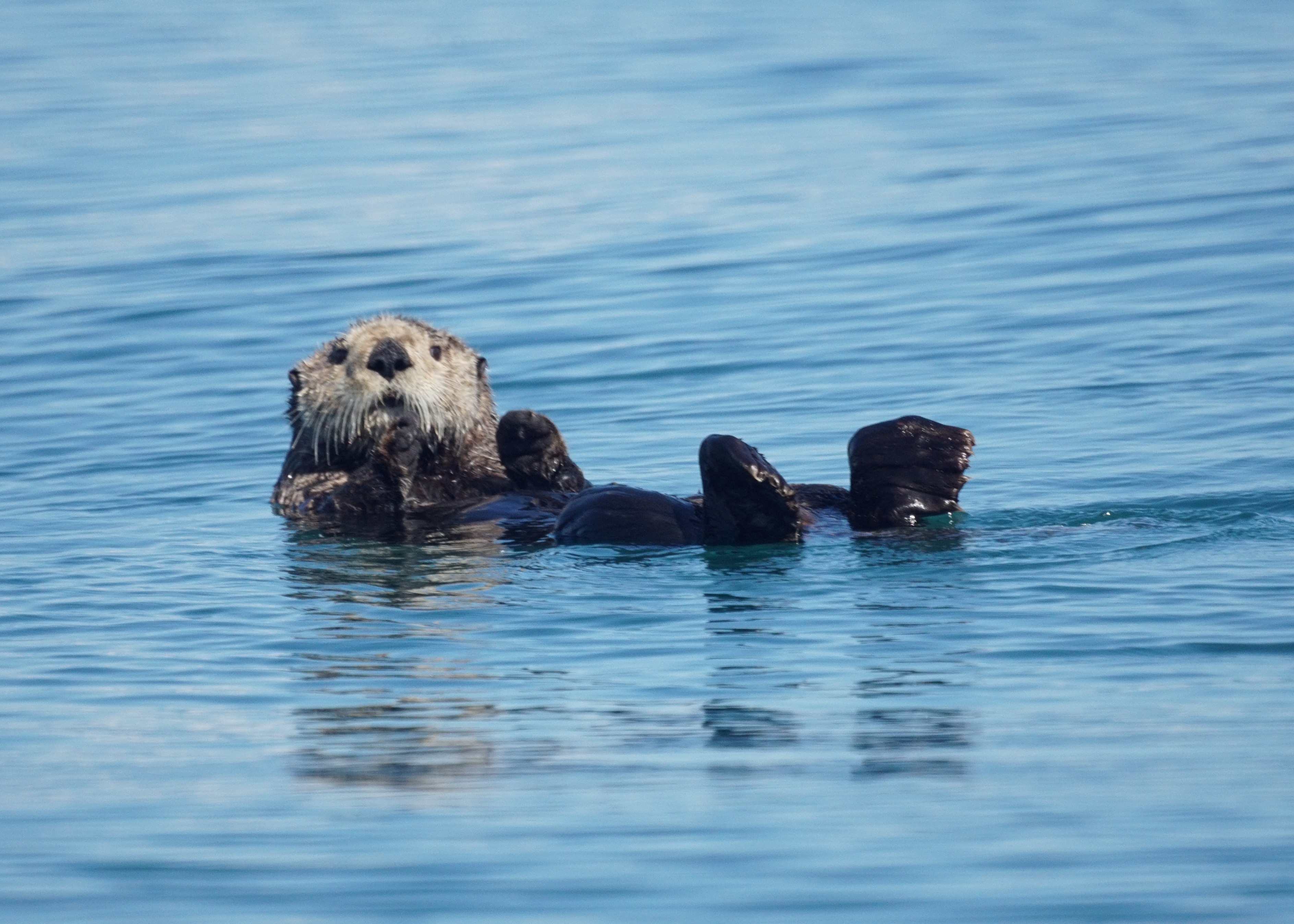 Sea otter